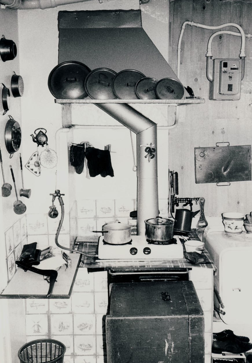 Omodernt kök, Bastugatan, kv. Fotangeln, 1971